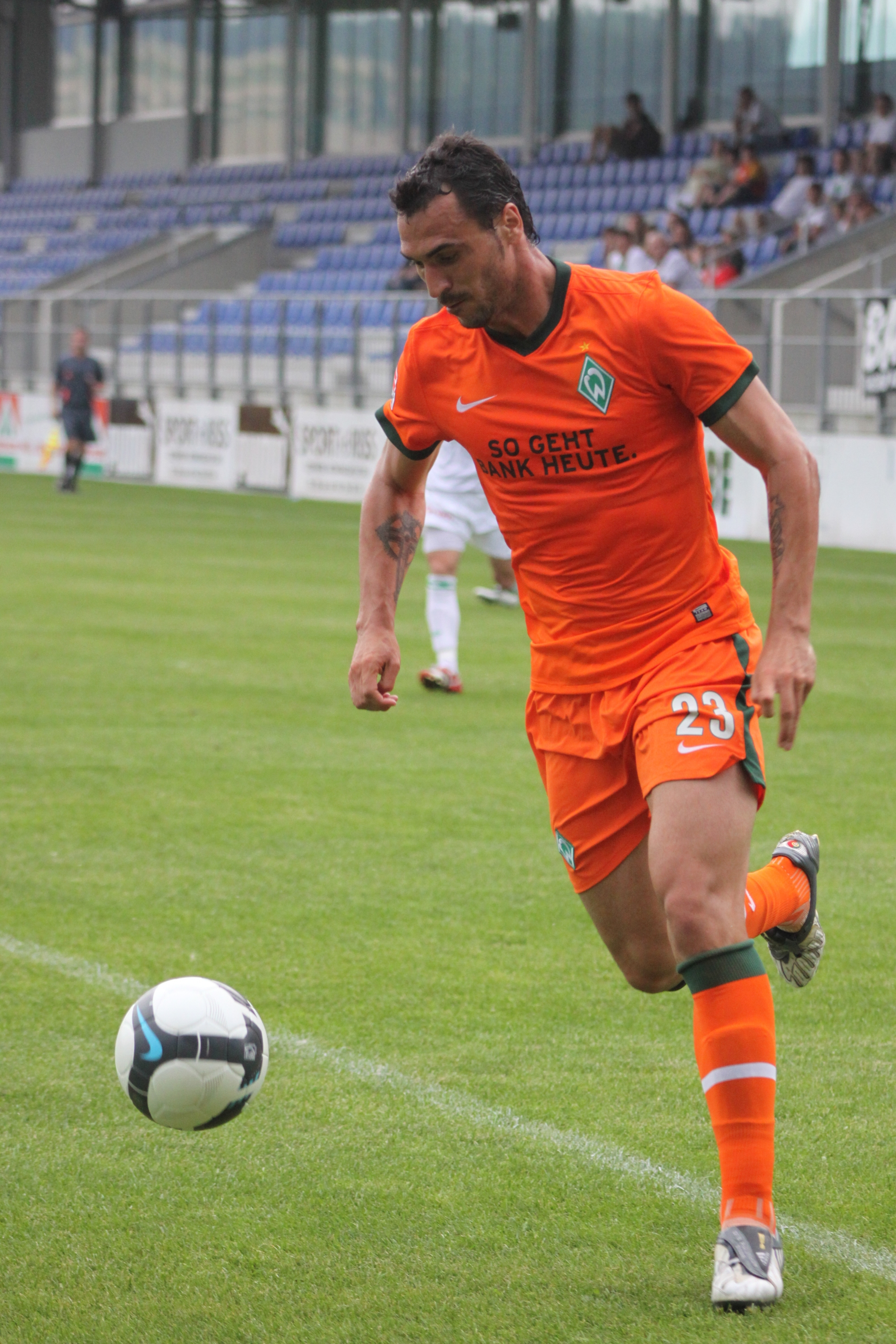 Hugo Almeida - SV Werder Bremen (4)